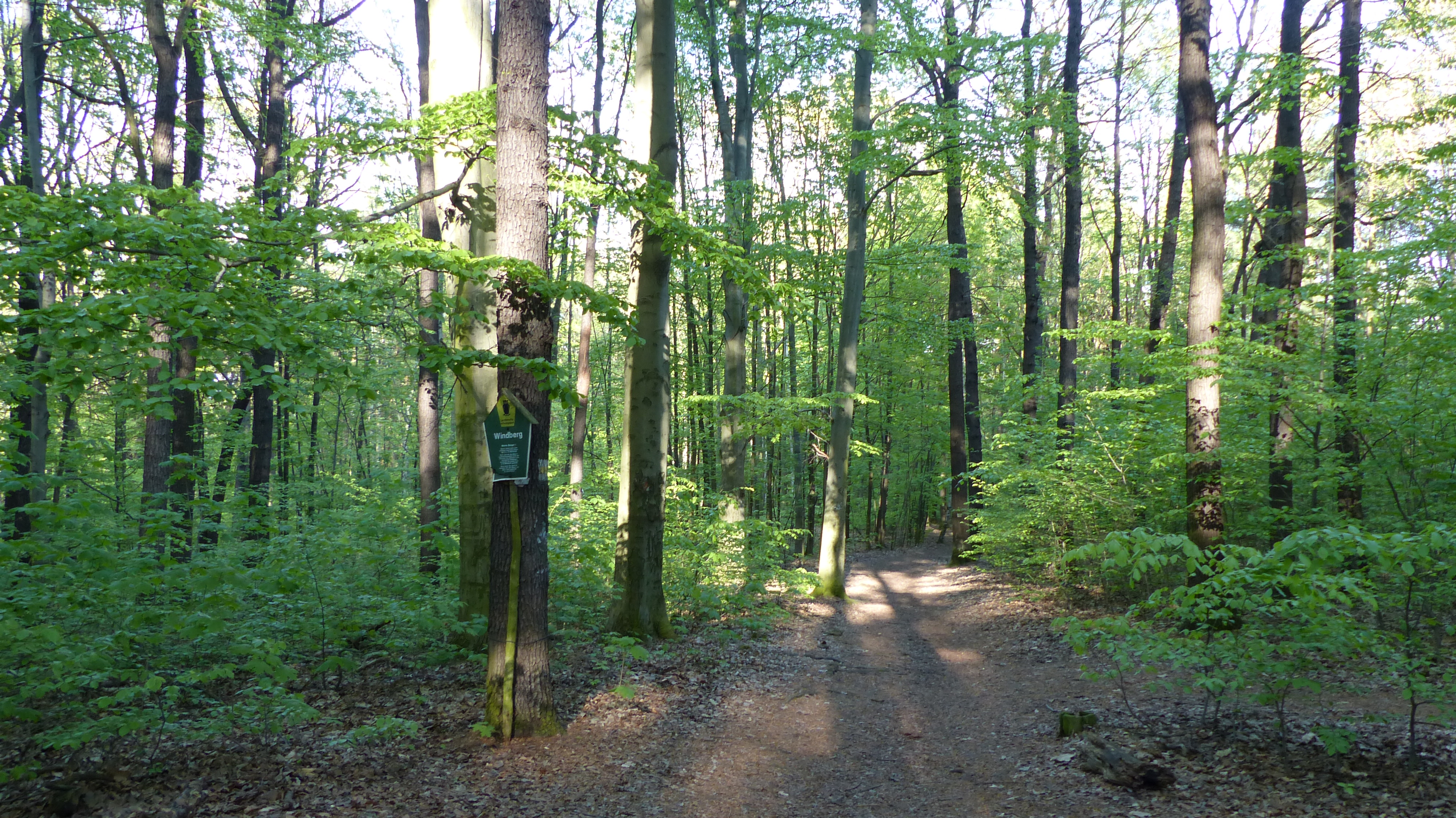 Naturschutzgebiet Windberg (Freital), Sachsen